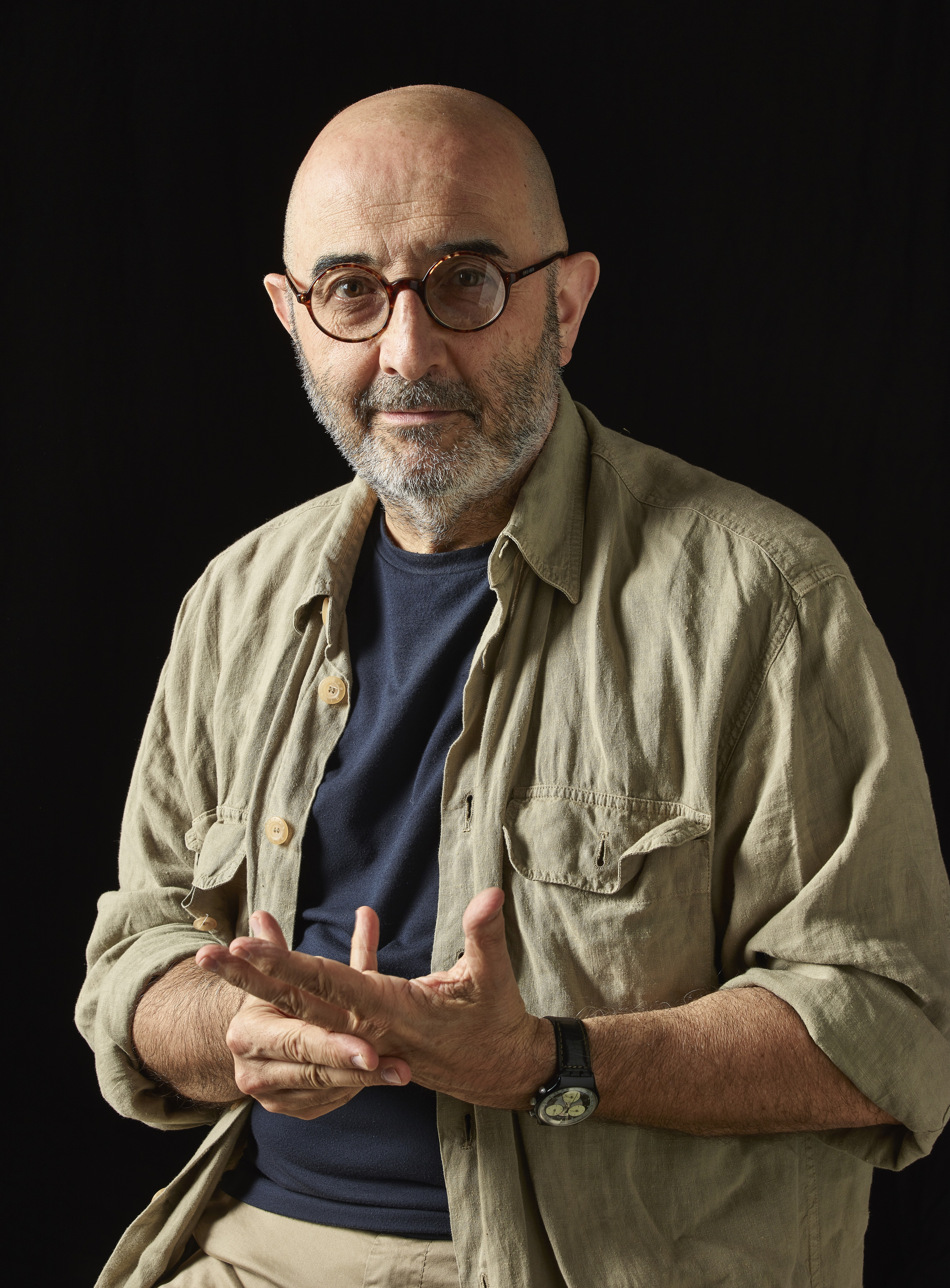 Ritratto